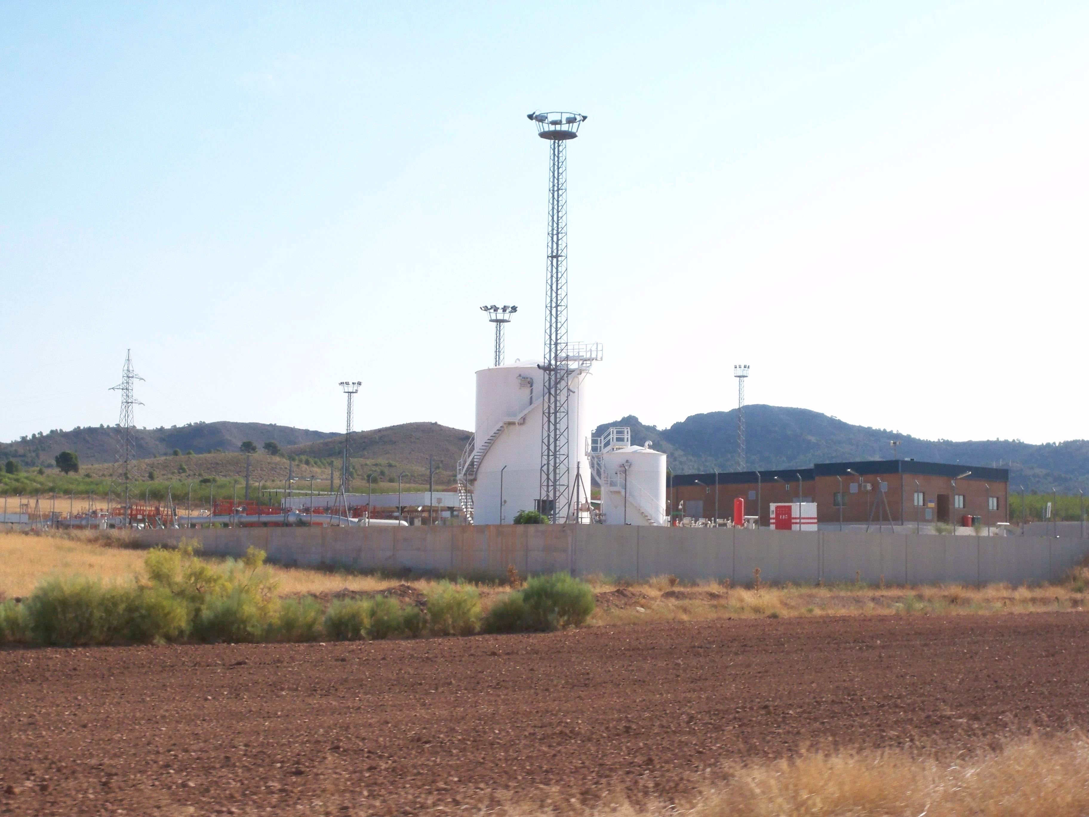 Estación de bombeo del oleoducto Cartagena-Puertollano en la CM-412, en la comarca albaceteña de la Sierra del Segura